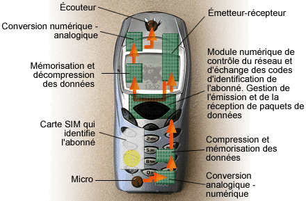 Téléphone mobile Auteur : Ggbb sous licence GFDL